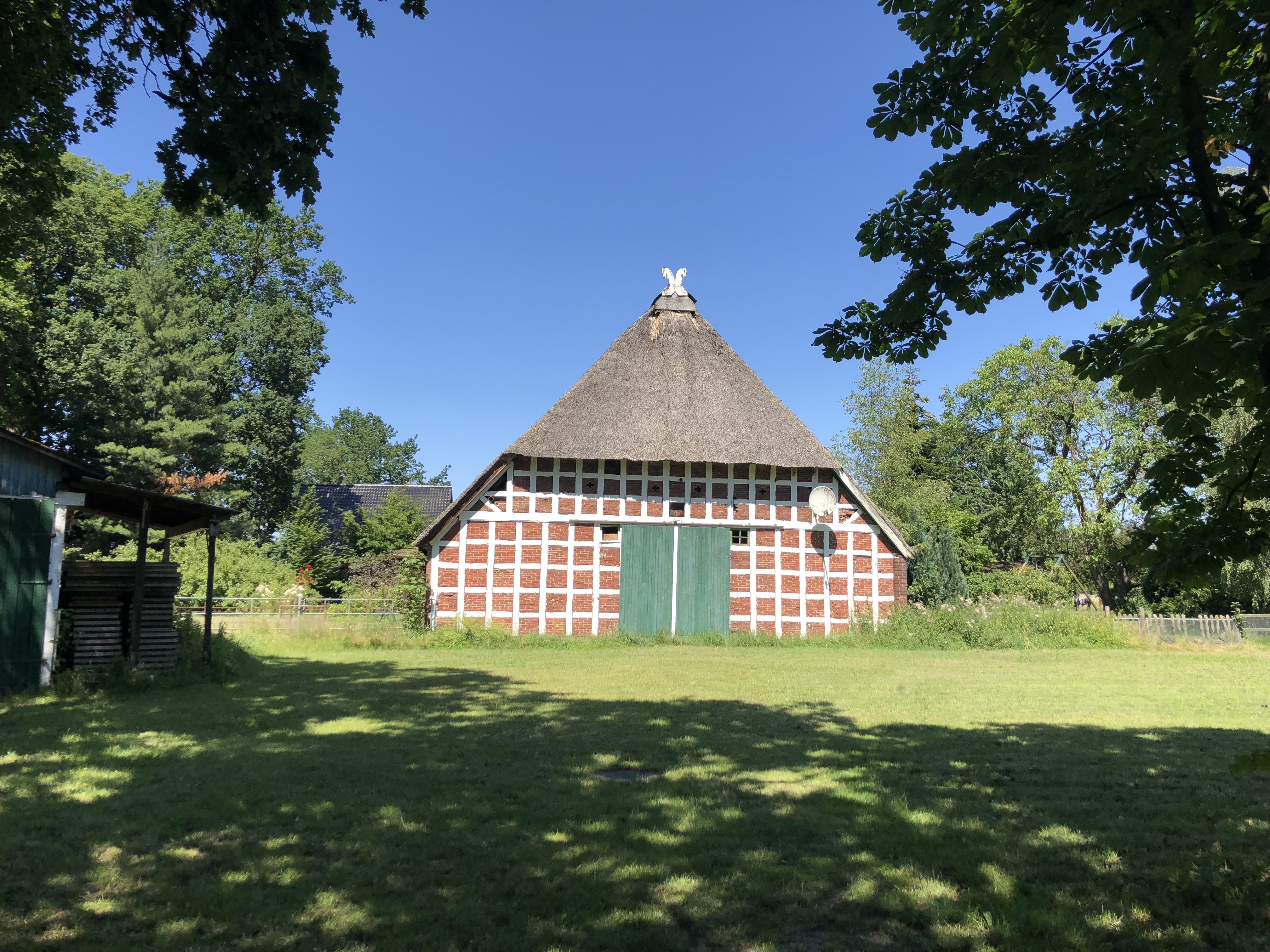 Oold Neddersassenhuus in Groot Woonst